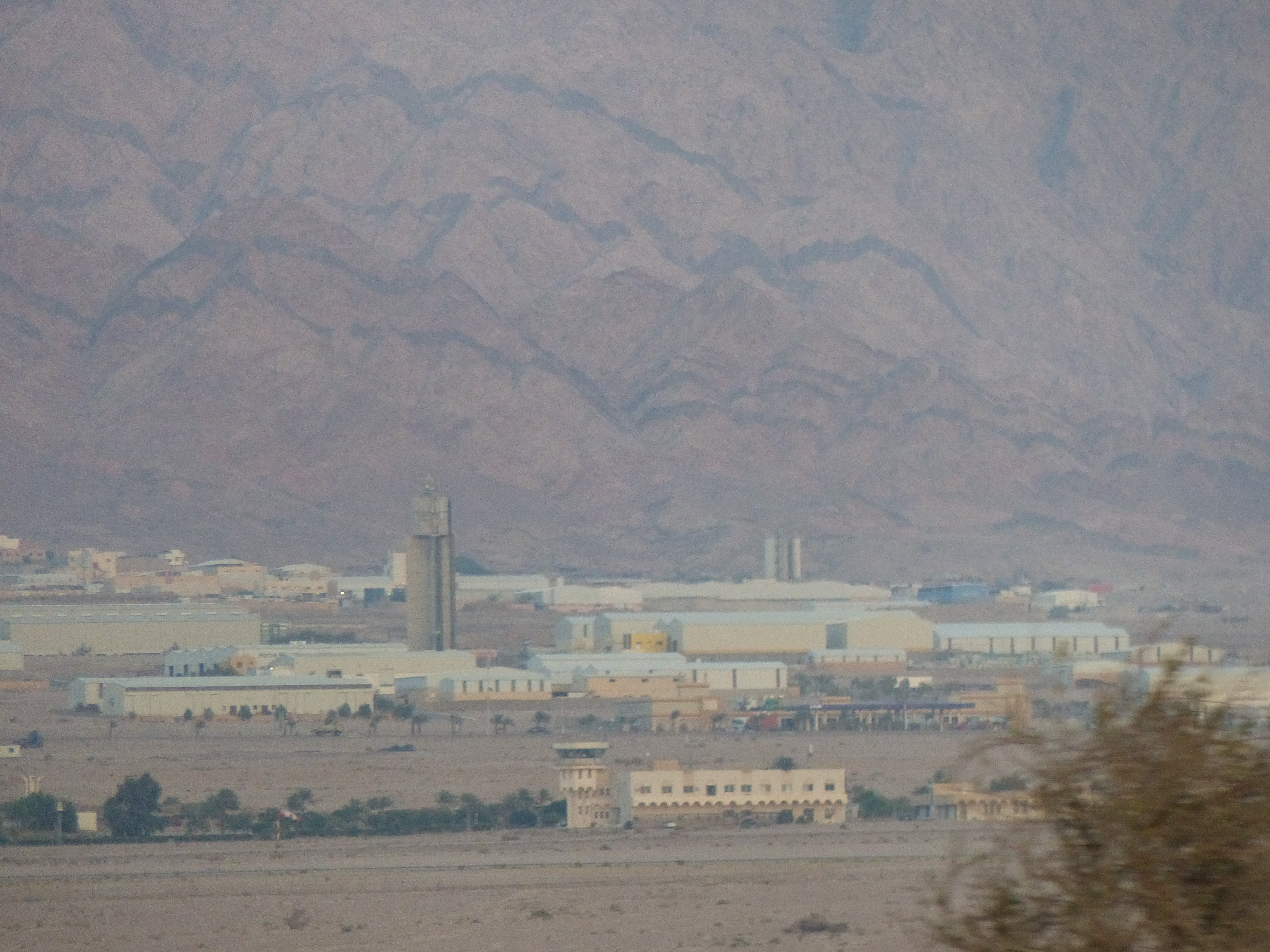 Aeropuerto Internacional Rey Hussein, Jordania. Fotografía tomada desde Israel.